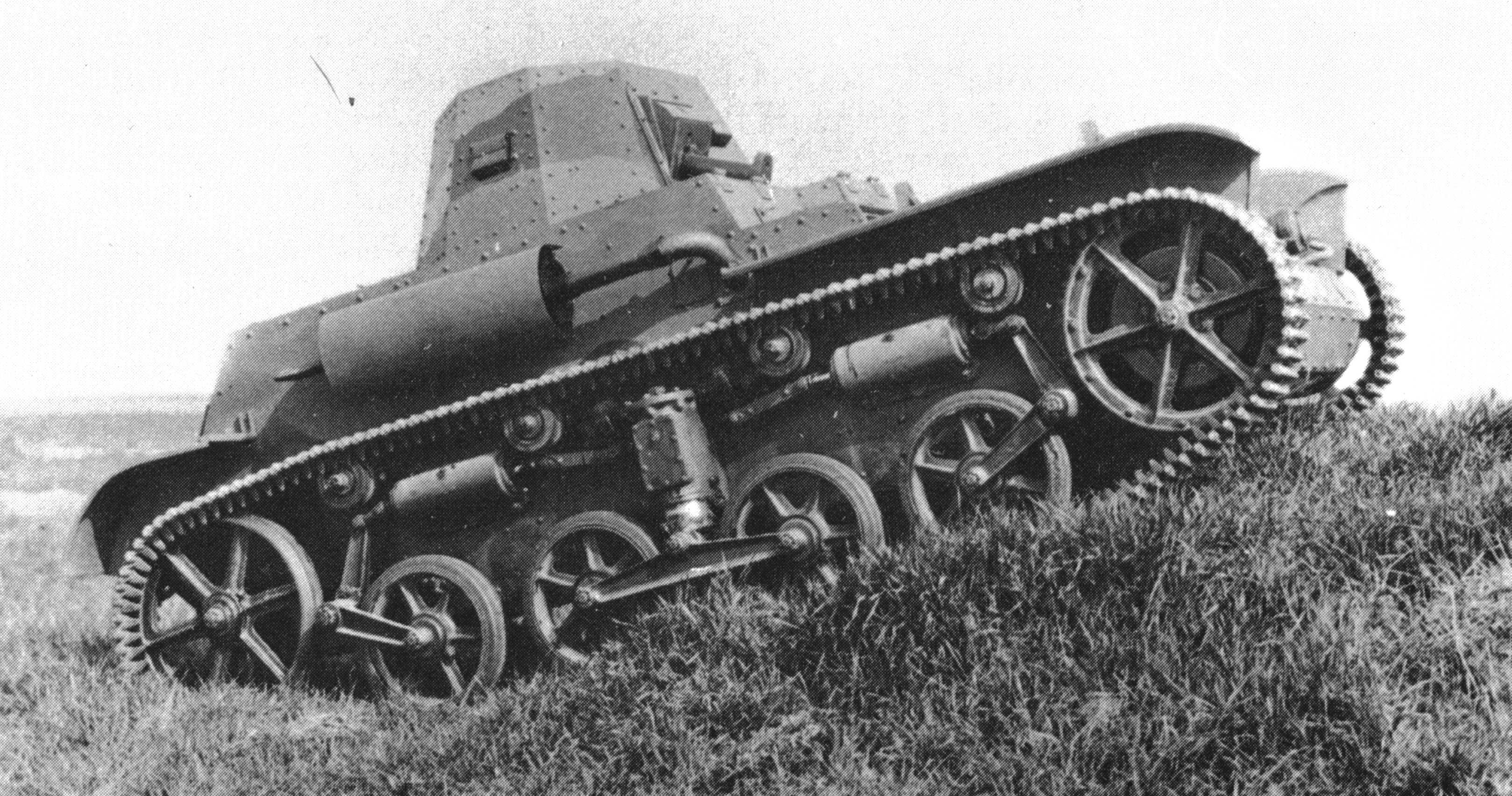 Digitale reproductie foto van prototype 79757 van de AMR 33